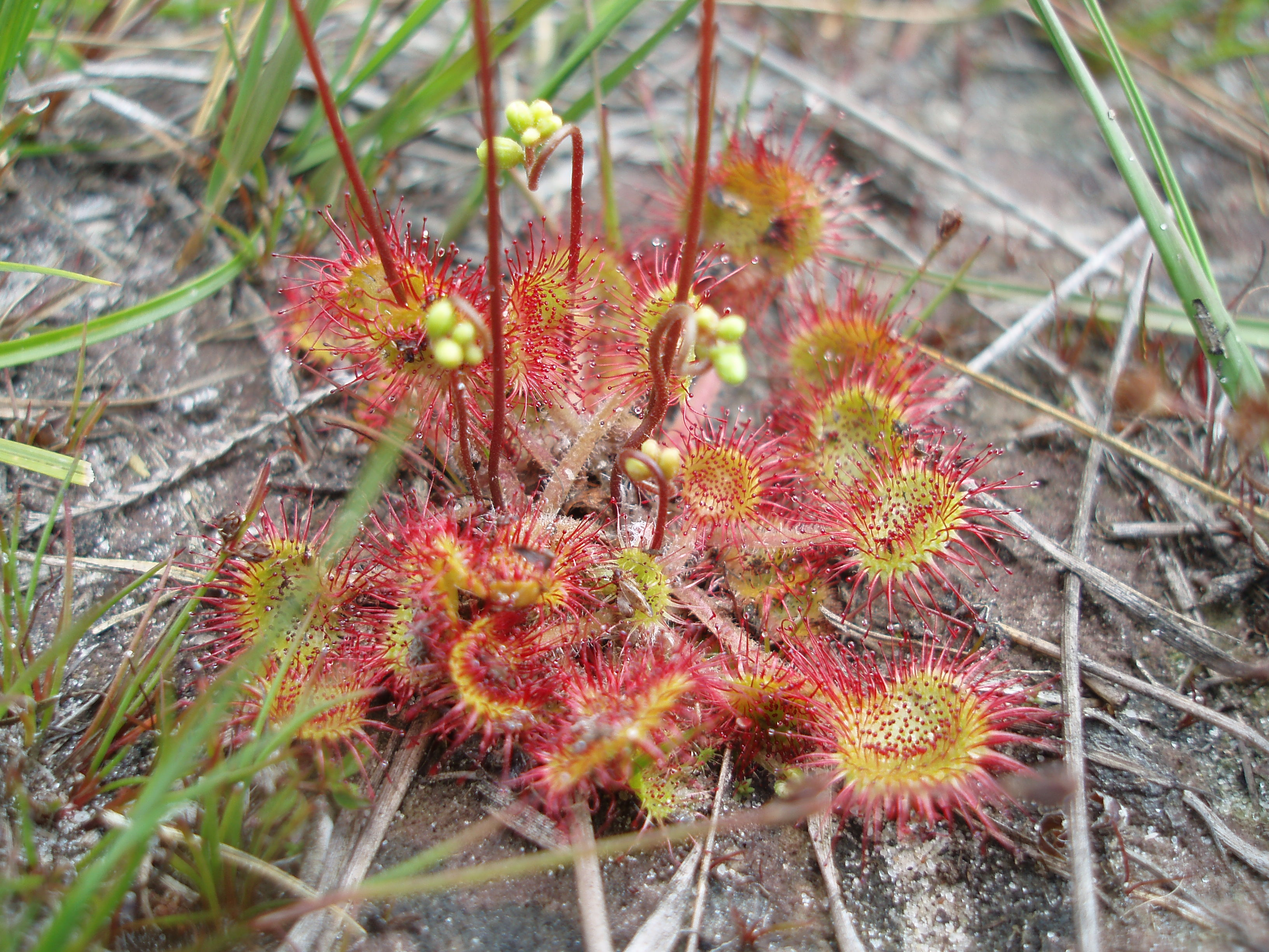 Rundblättriger Sonnentau (Drosera rotundifolia) im Nationalpark Drents-Friese Wold, Niederlande